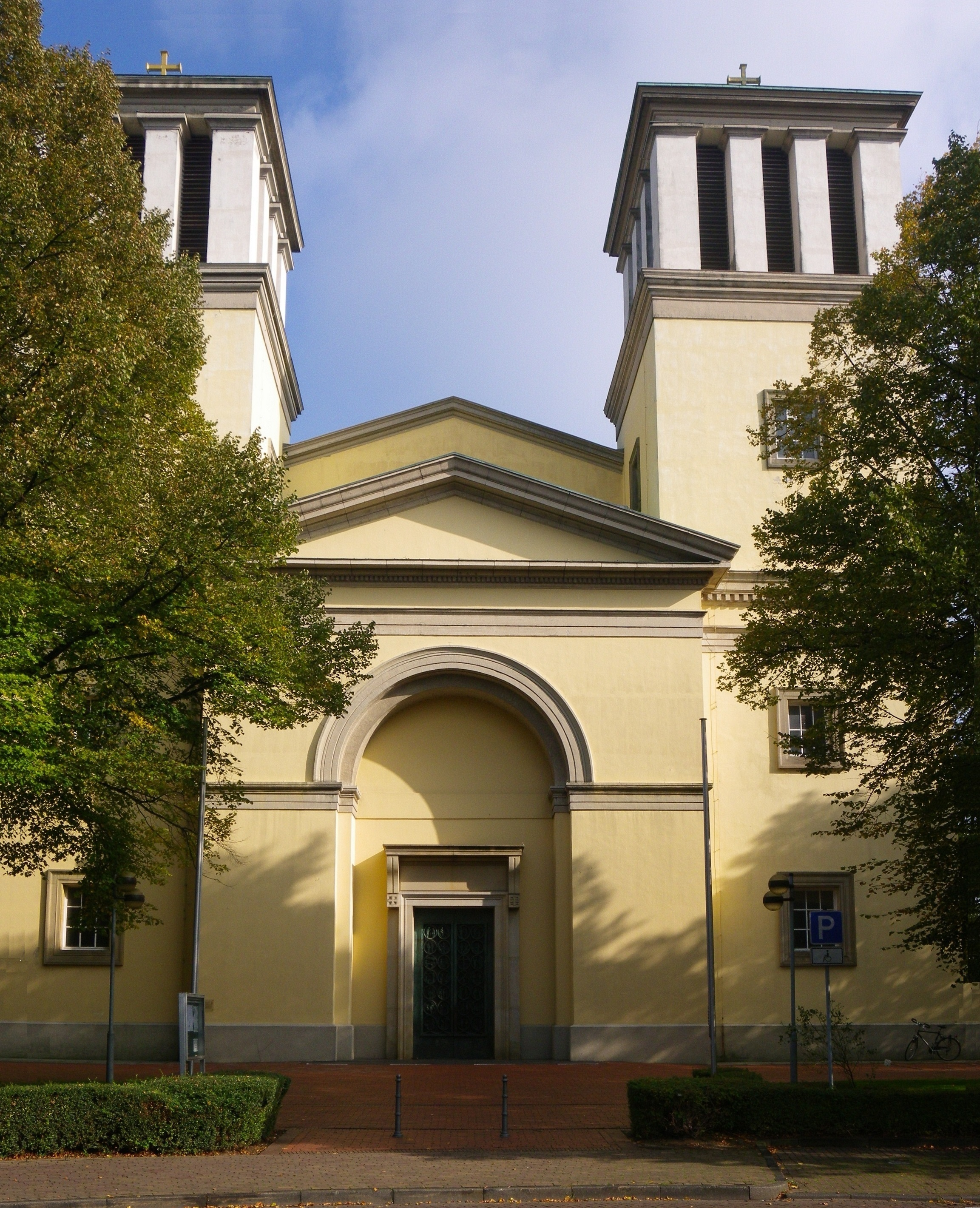 Kath. Kirche St. Mariä Himmelfahrt, Rees